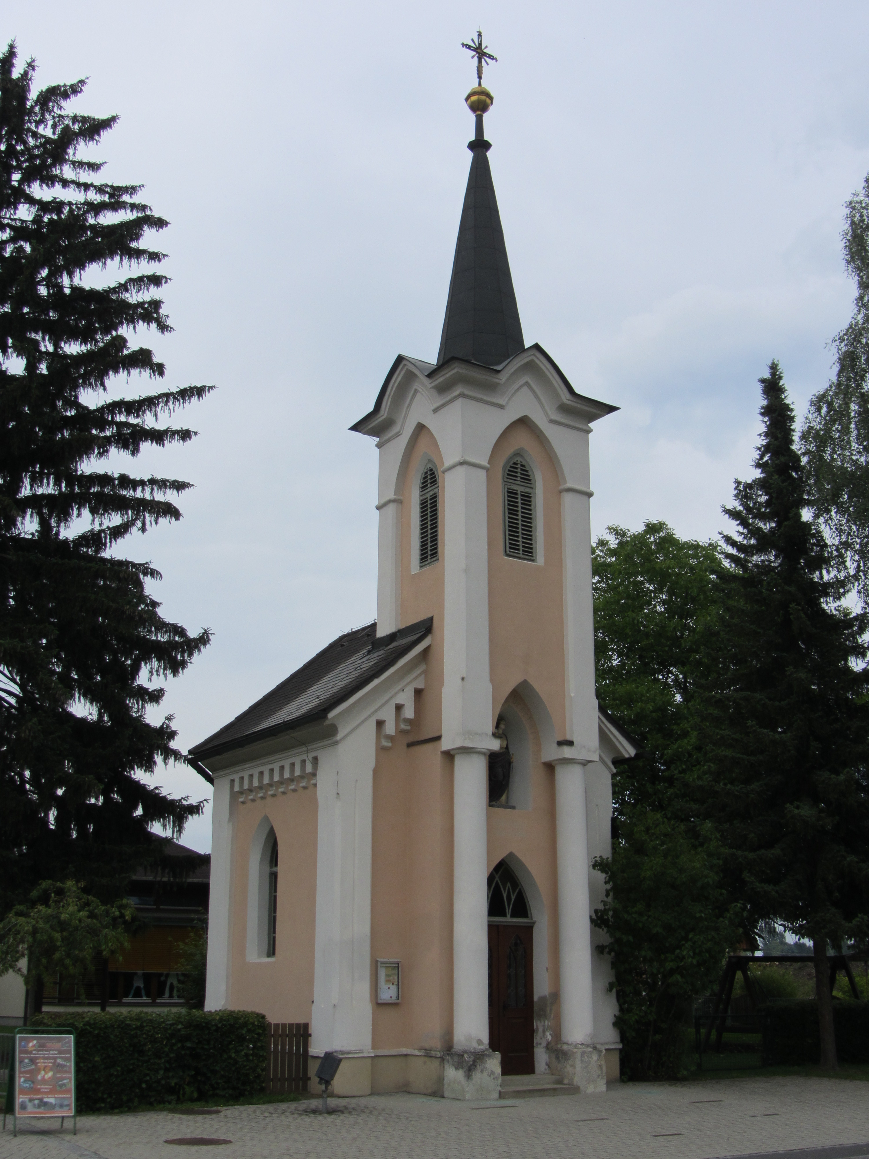 Ortskapelle